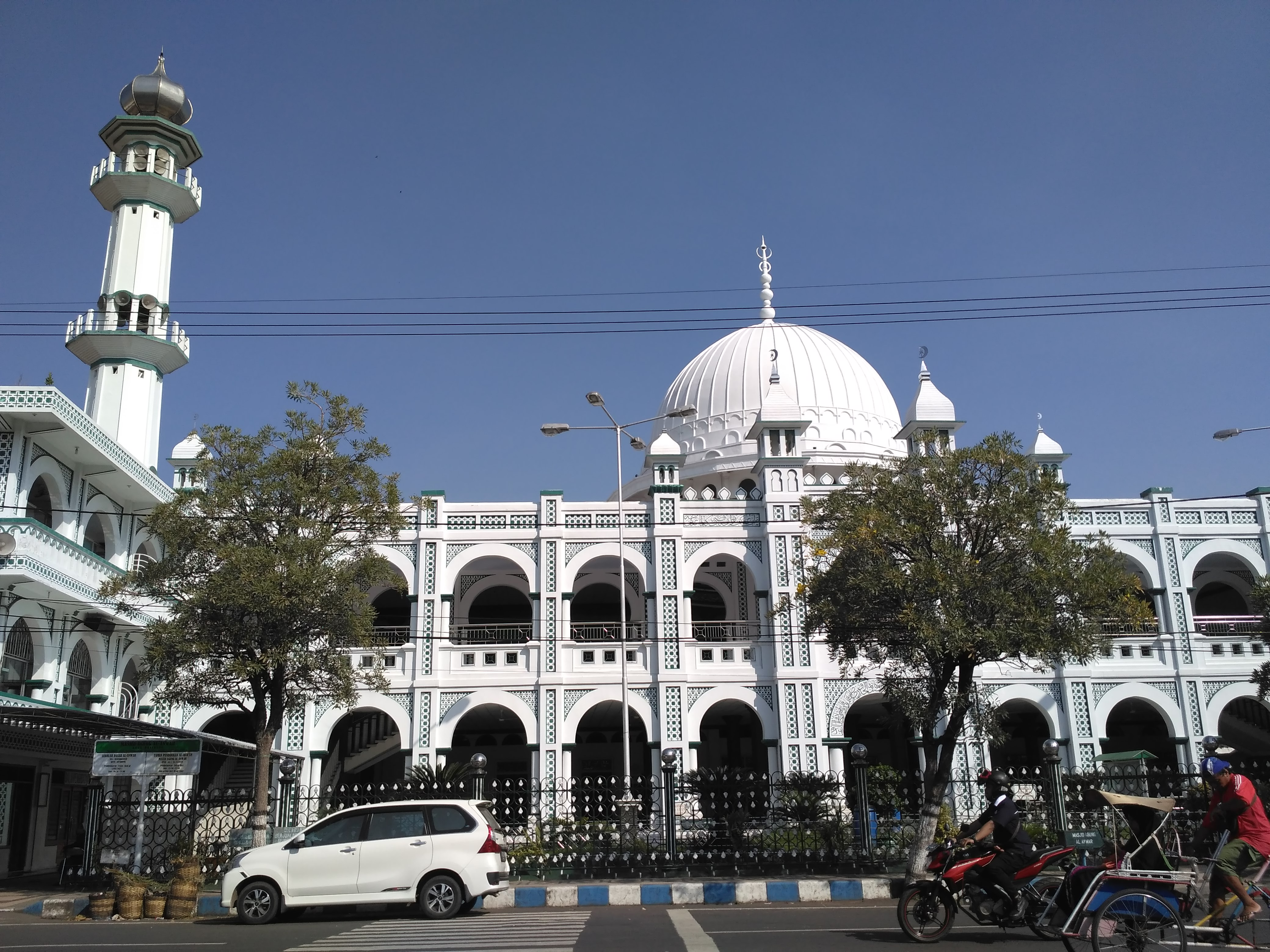 Masjid Agung Pasuruan dekat alun-alun kota Pasuruan.